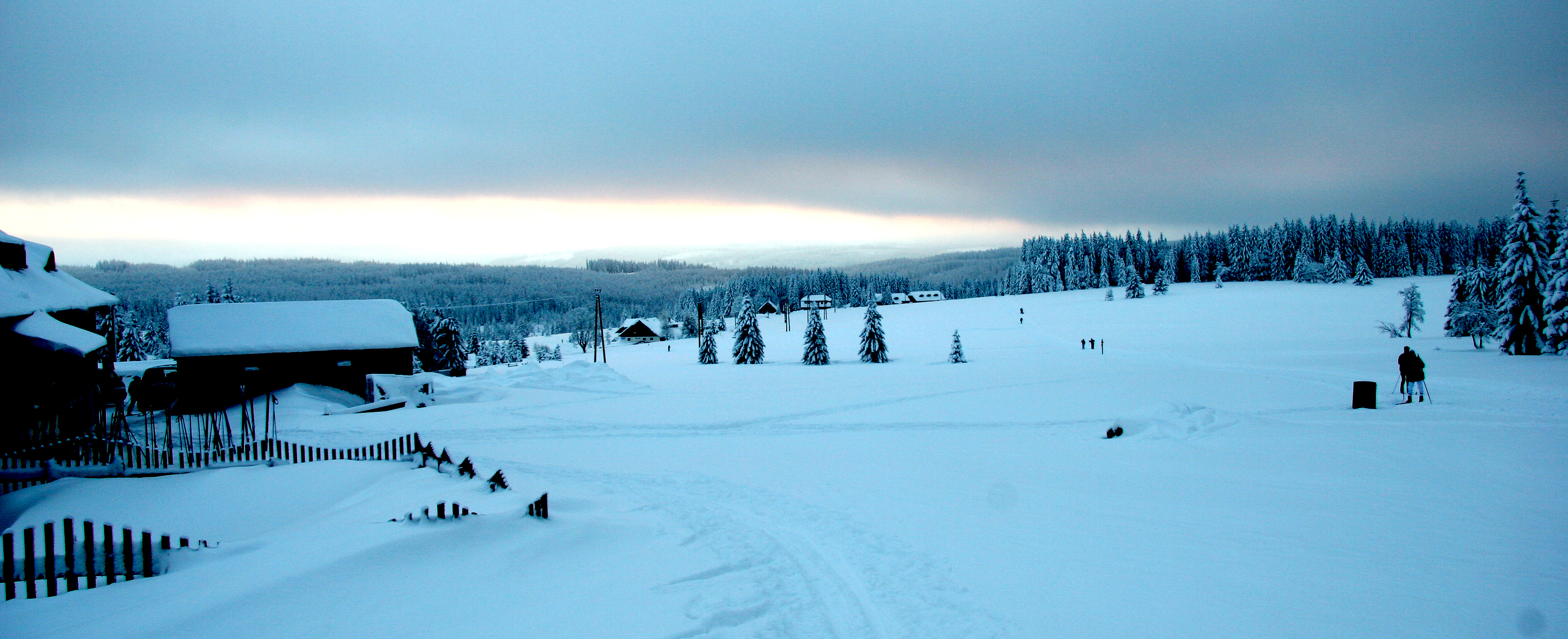 Winterlicher Böhmerwald aufgenommen am 30.12.2005 gegen 17:00 Uhr von mir (Sebastian Schreiber) selbst.